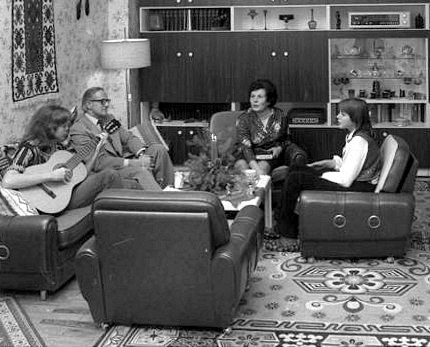 Thea Hauschild, Oberbürgermeisterin von Dessau, Anfang der 1980er Jahre im Kreis ihrer Familie. (veröffentlicht im Februar 1981, vermutlich um den zweiten Advent 1980 entstanden)